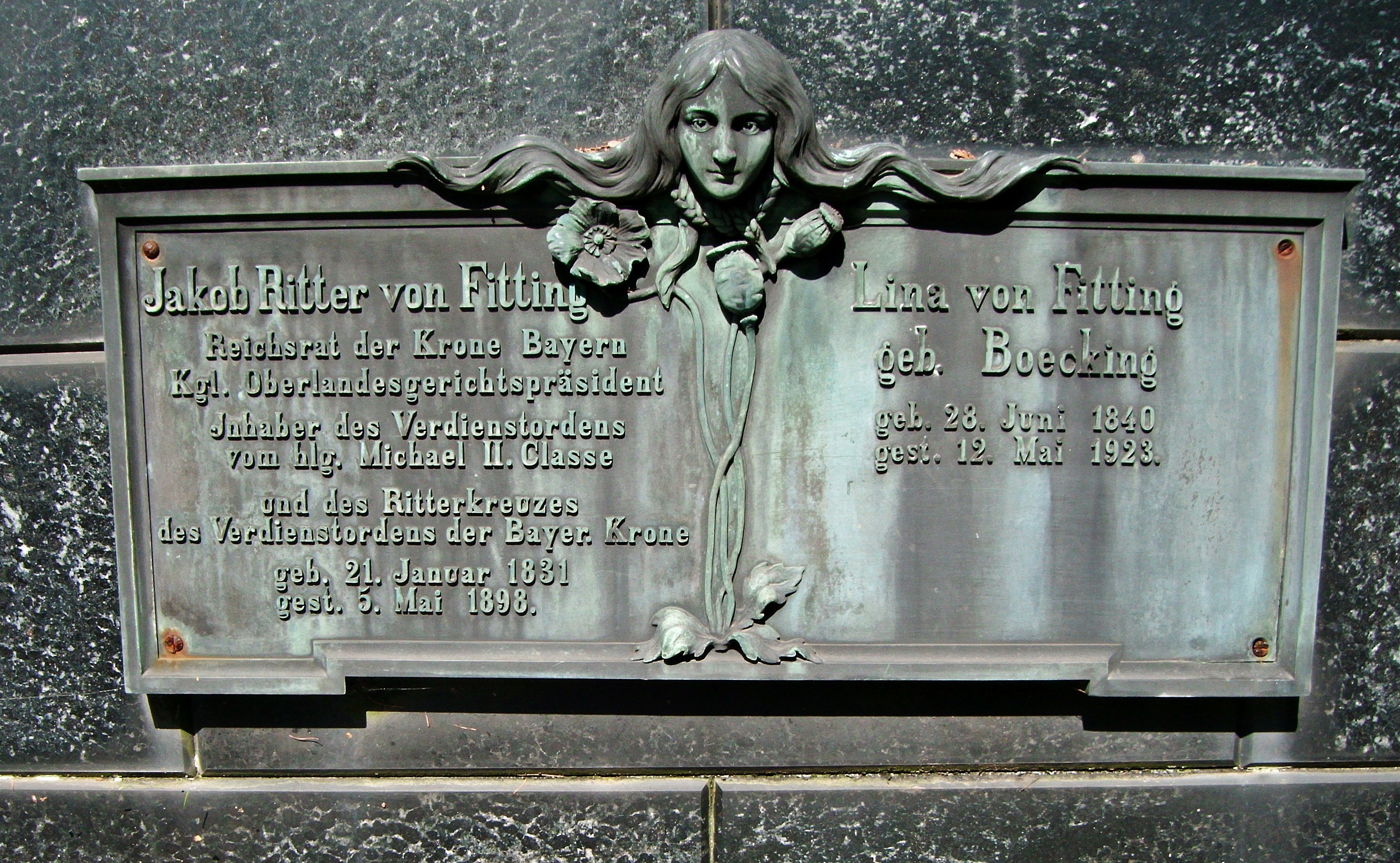 Jakob von Fitting (1831-1898), Bayerischer Reichsrat und Oberlandesgerichtspräsident, Grabinschrift, Hauptfriedhof Zweibrücken